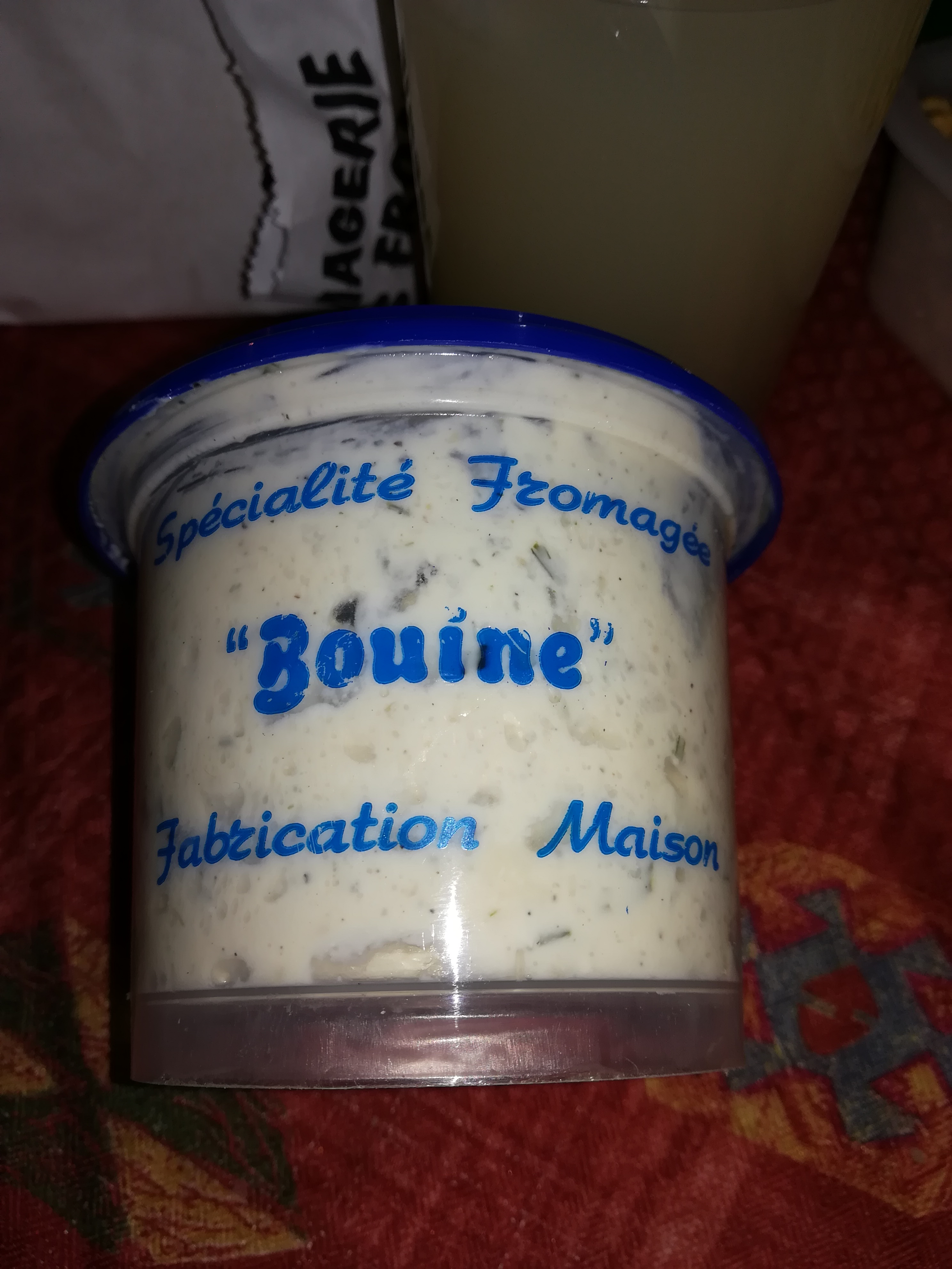 Pot de bouine produite en Sarthe.